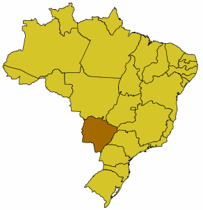 Karte Brasiliens, Mato Grosso do Sul hervorgehoben, GFDL nach der Vorlage Bild:Brasilien Bundesstaaten.png